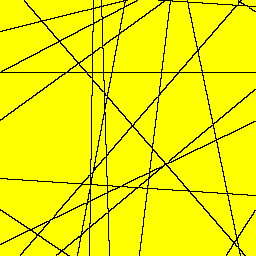 Mosaïque de Poisson générée par 20 droites de Poisson